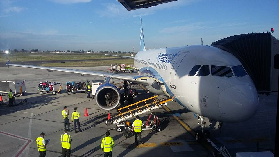 espectacular a320 de interjet en plataforma